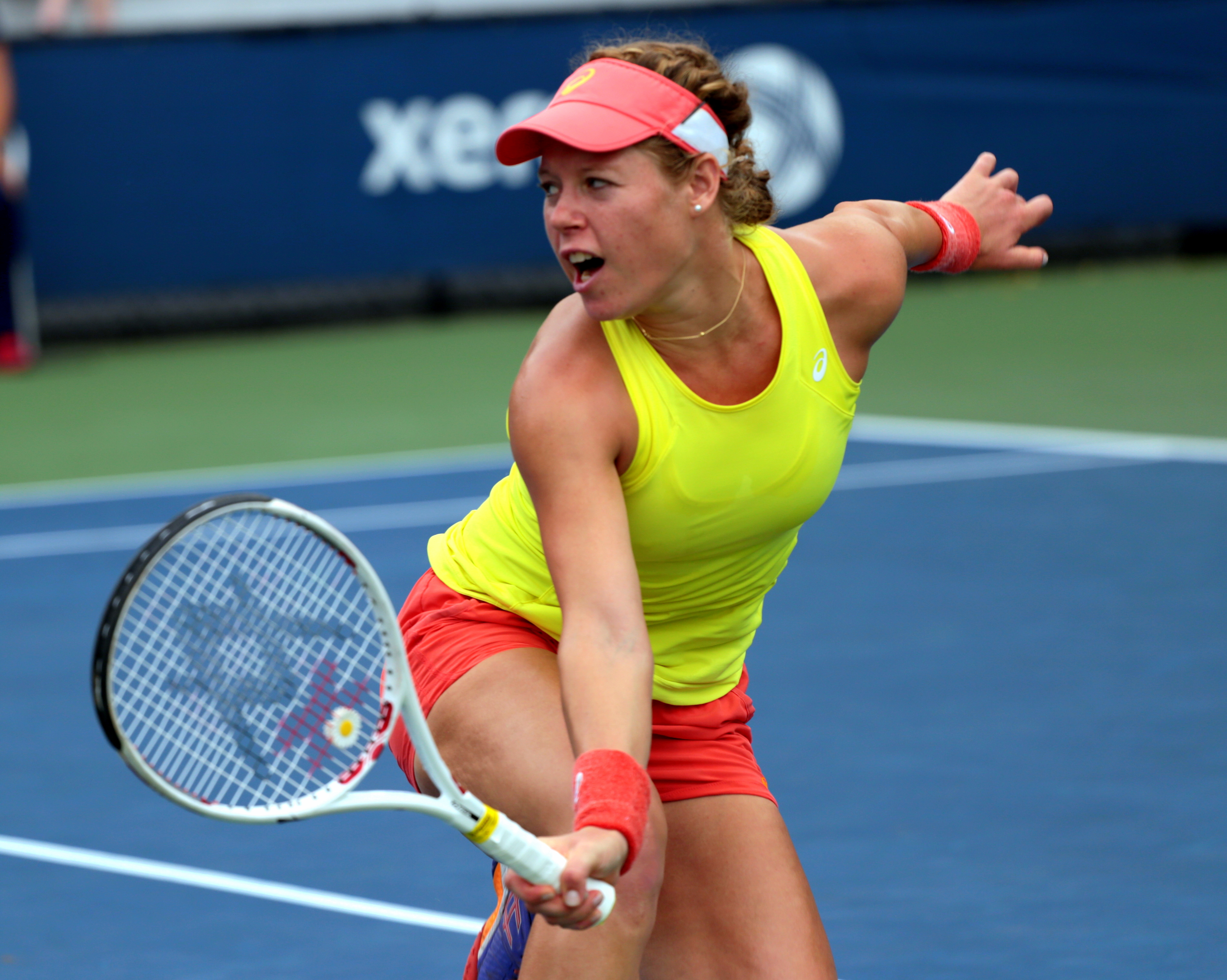 Laura Siegemund at the 2015 US Open